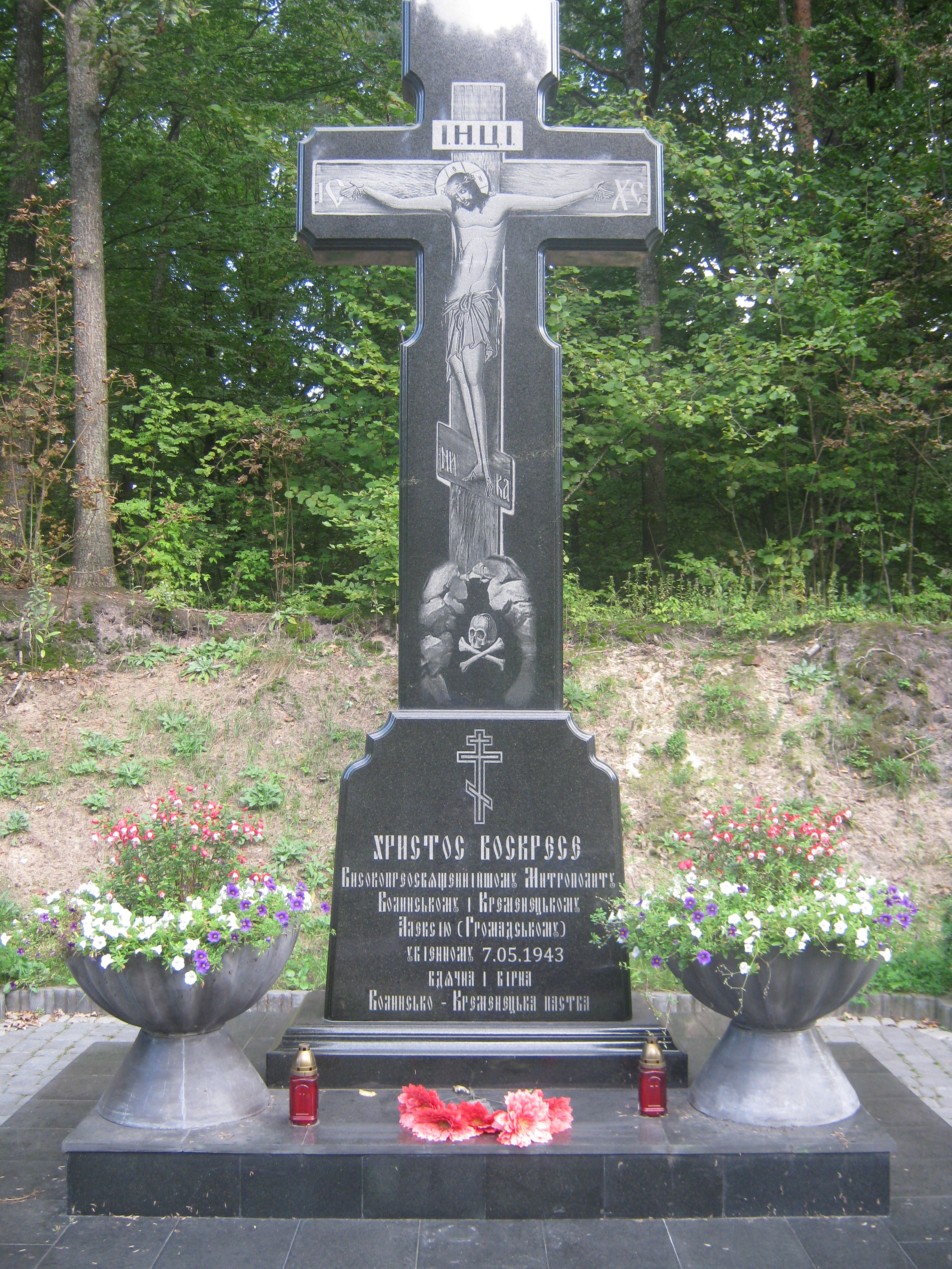 Памятник на місці загибелі митрополита Олексія (Громадського) біля смт. Смига.